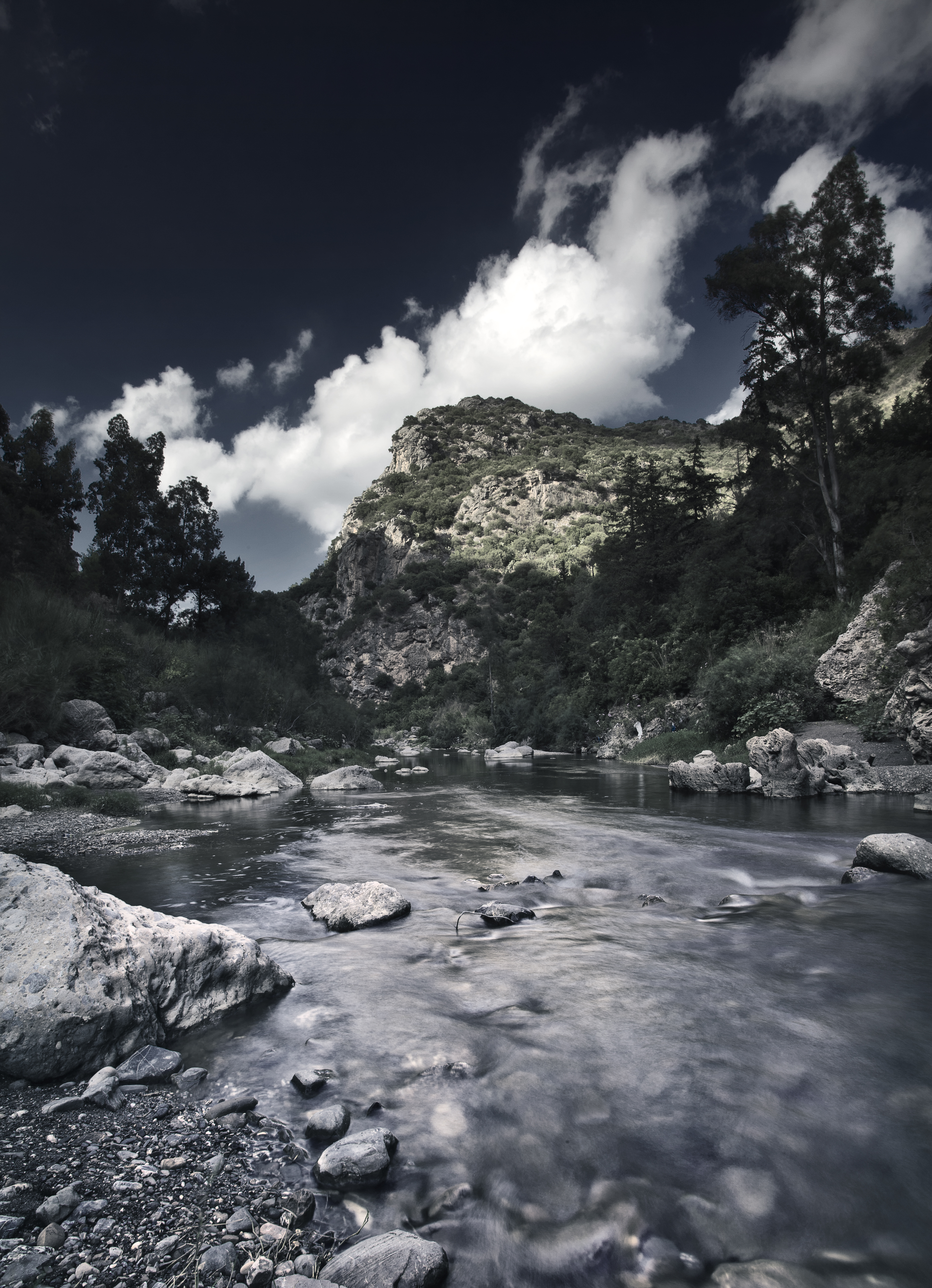 Oued Isser, Lakhdaria, wilaya de Bouira en Algérie